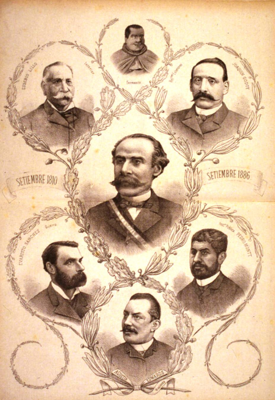 Presidente José Manuel Balmaceda, al centro con sus Ministros: Evaristo Sánchez, min. Guerra; Eusebio Lillo, min. Interior; Joaquín Godoy, min. Relaciones Exteriores; Pedro Montt, min. Instrucción Pública y Agustín Edwards, min. Hacienda. Grabado en 1886, (Colección Diapositivas Biblioteca Nacional. Fuente: Padre Padilla)